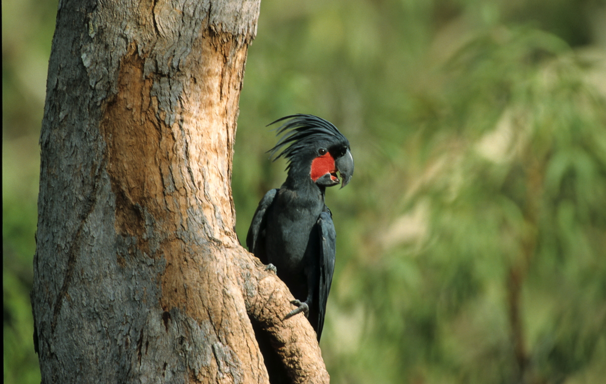 Junges Palmkakaduweibchen auf der Kap-York-Halbinsel